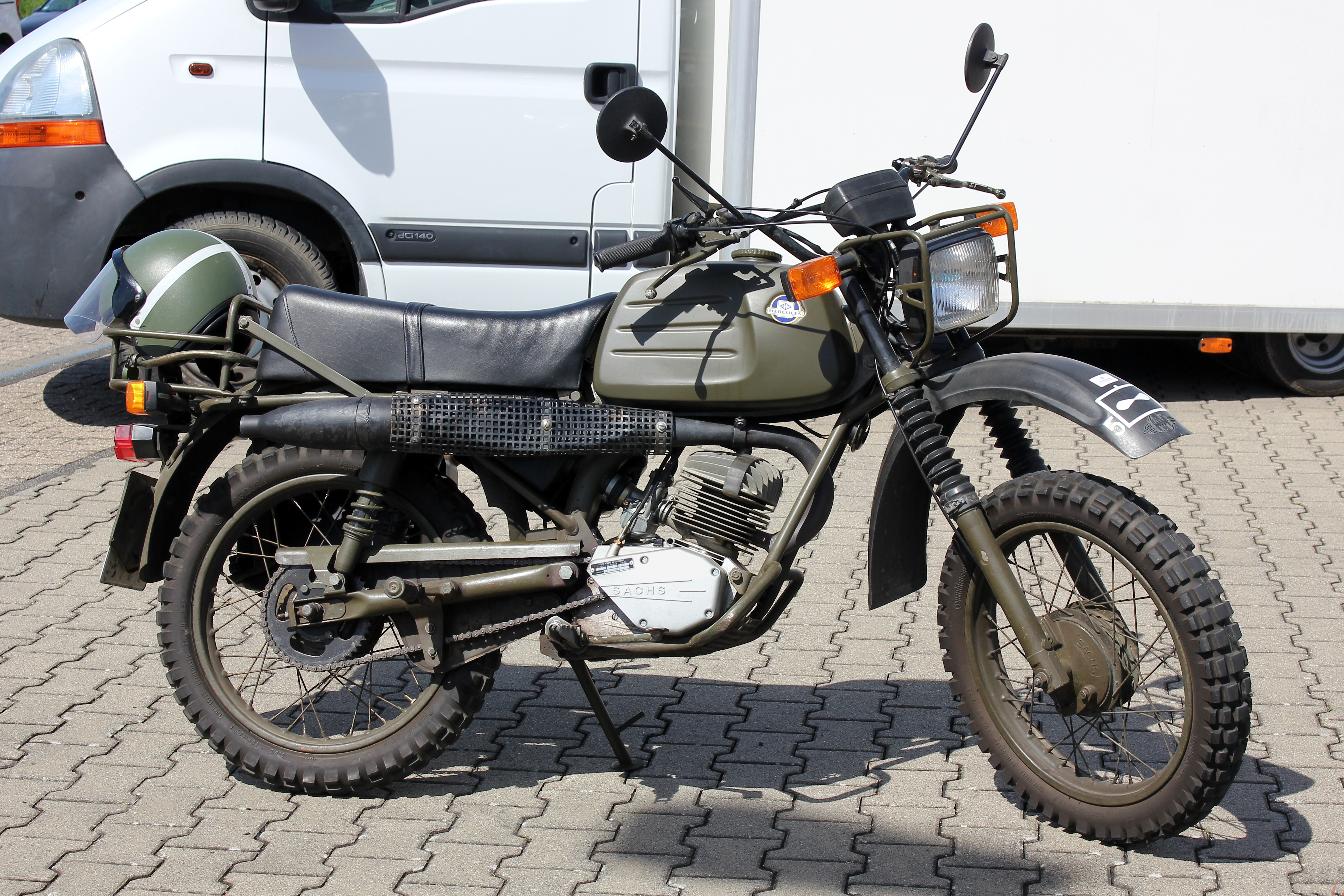 Hercules K 125 BW, Baujahr 1973; Teleskopgabel nachgerüstet (ab etwa 1980 serienmäßig)